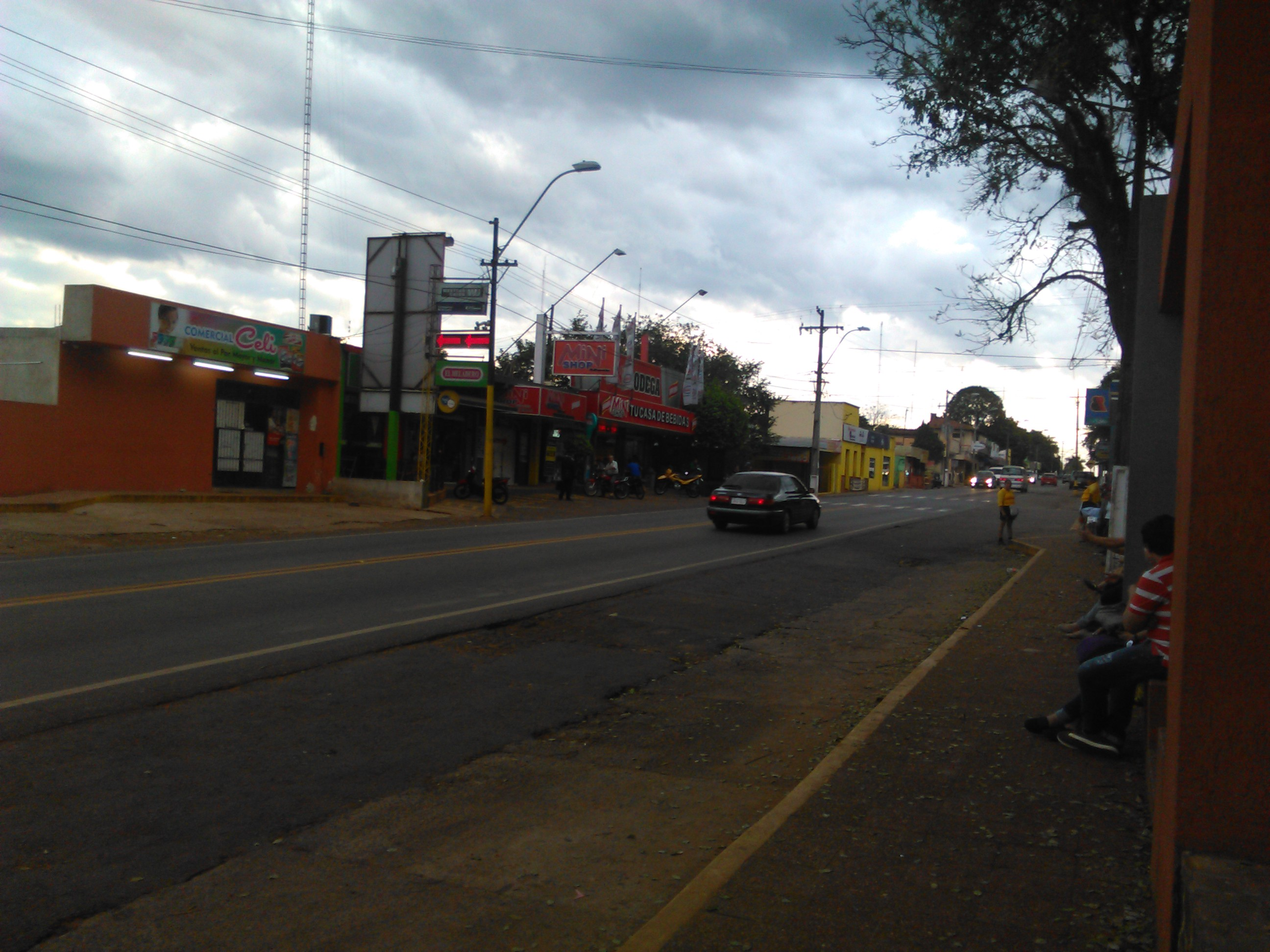 Centro de la ciudad de Itacurubí de la Cordillera.